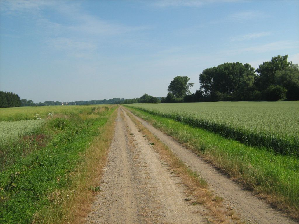 Weser-Harz-Heide-Radweg nördlich von Börßum Richtung Wolfenbüttel